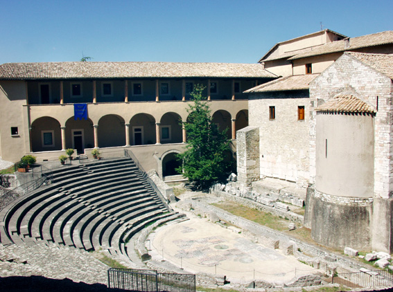 Spoleto (Italy) - Il Teatro Romano